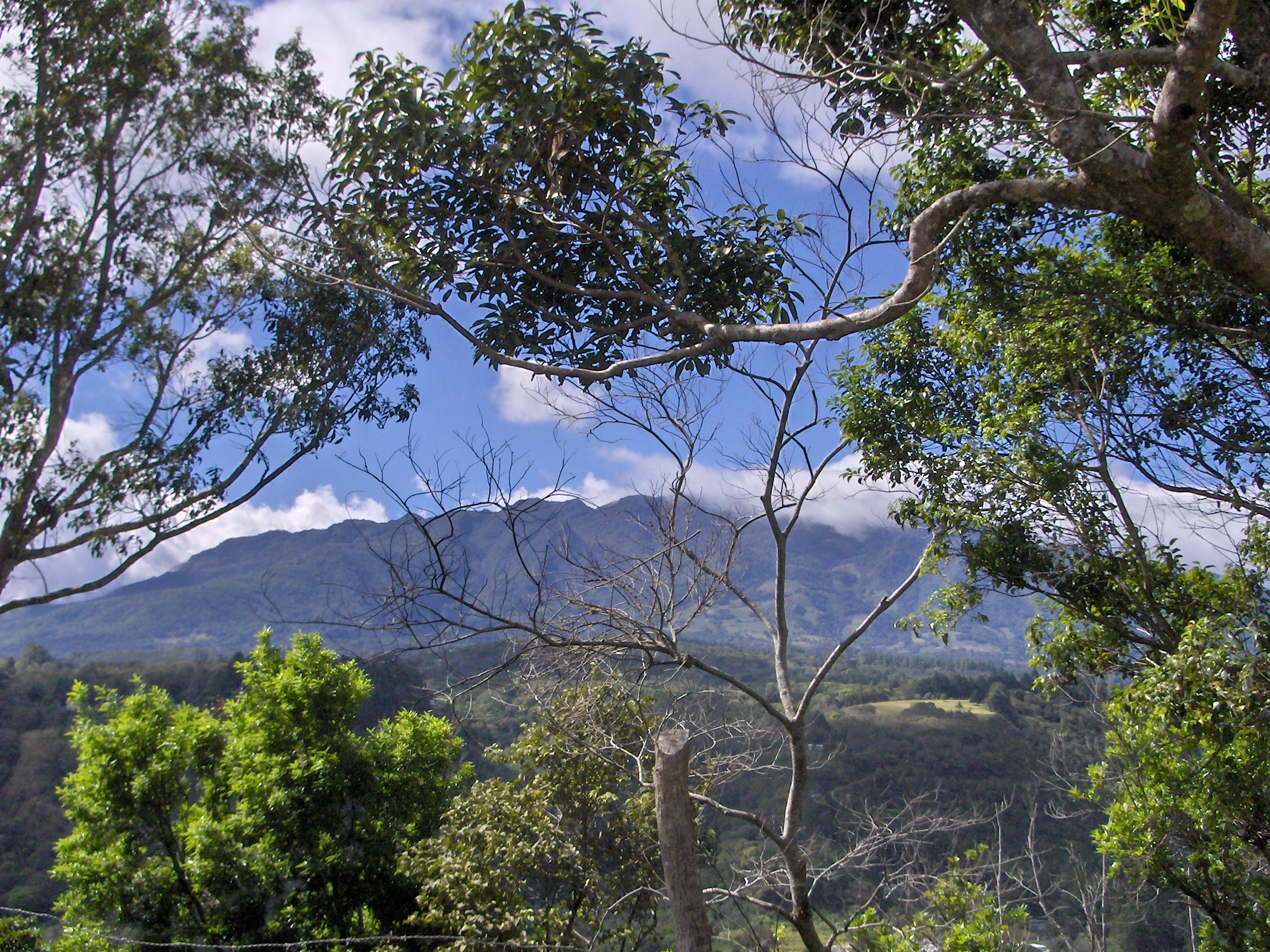 Vista de Volcan Barú